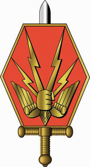 Insigne du Commandement des forces terrestres